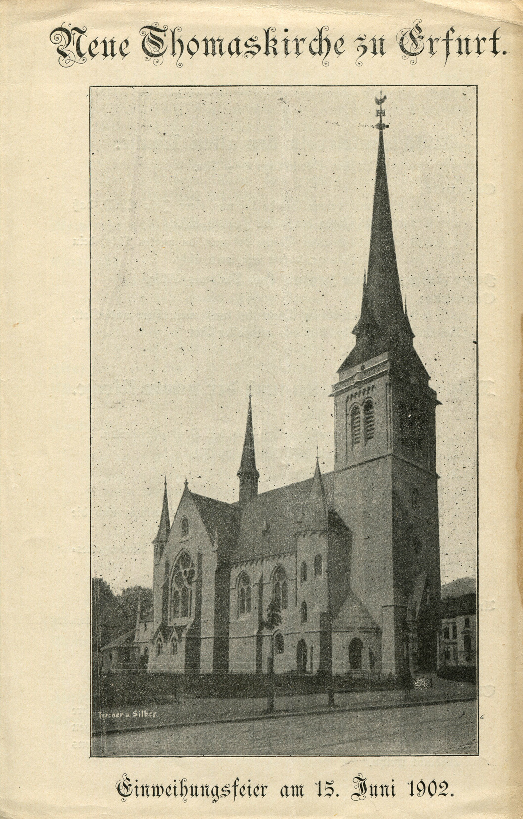 Eröffnungsfeier für die Neue Thomaskirche (1902)